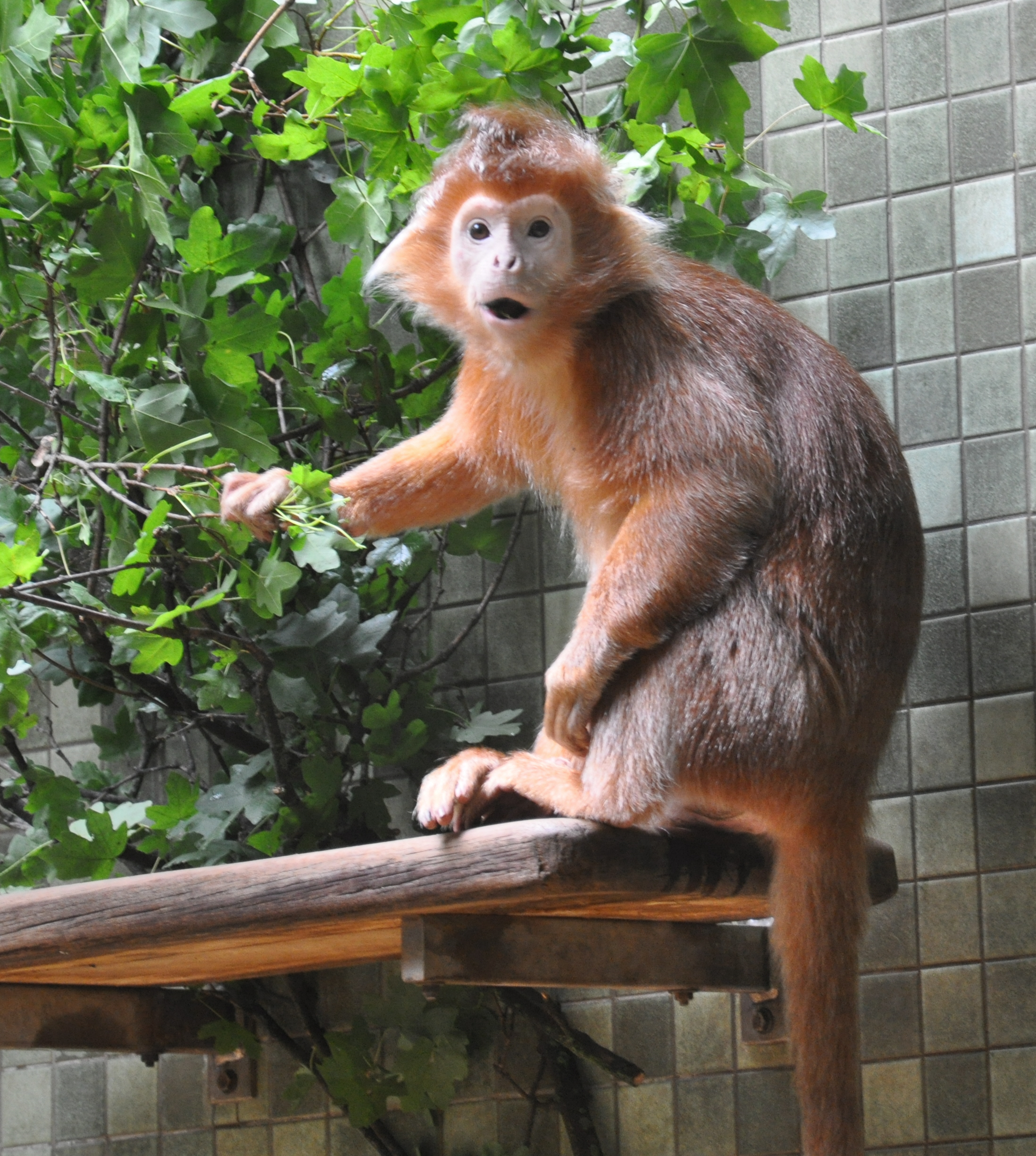 Haubenlangur, Laut Tafel "Presbytis cristatus pyrrhus (Horsfield, 1823)", Zoologischer Garten, Berlin